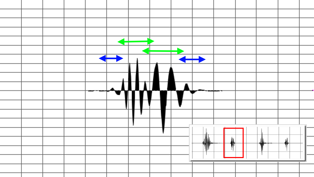 第二心音的波形